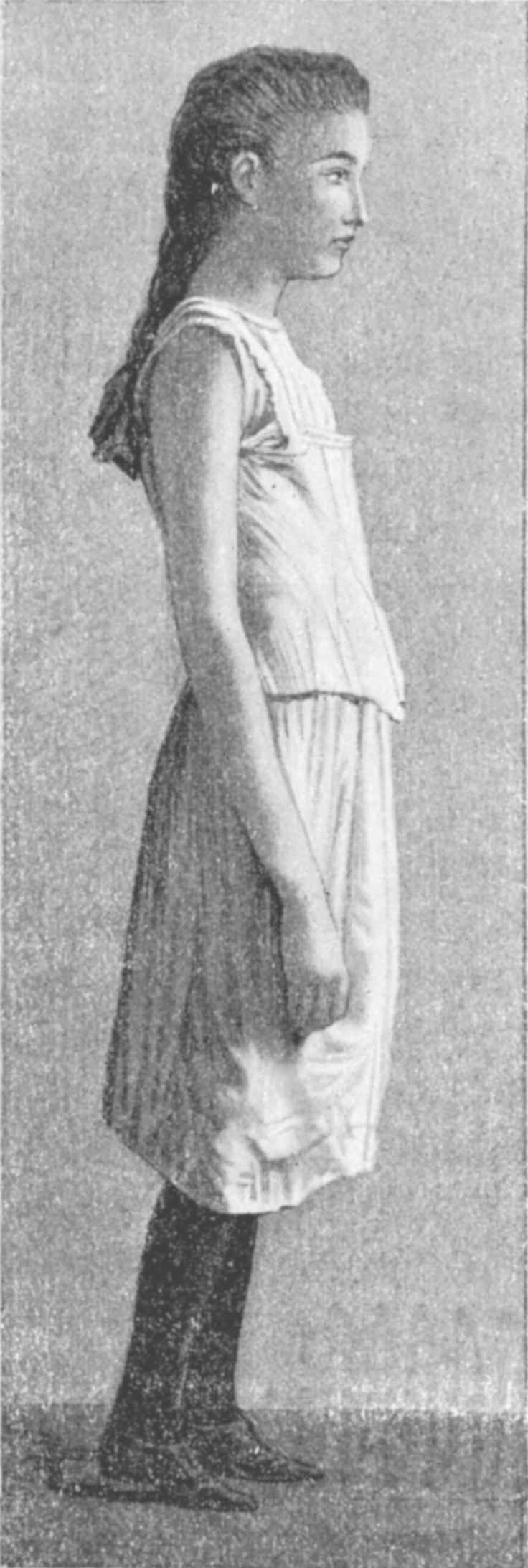 Fillette de douze ans avec une brassière